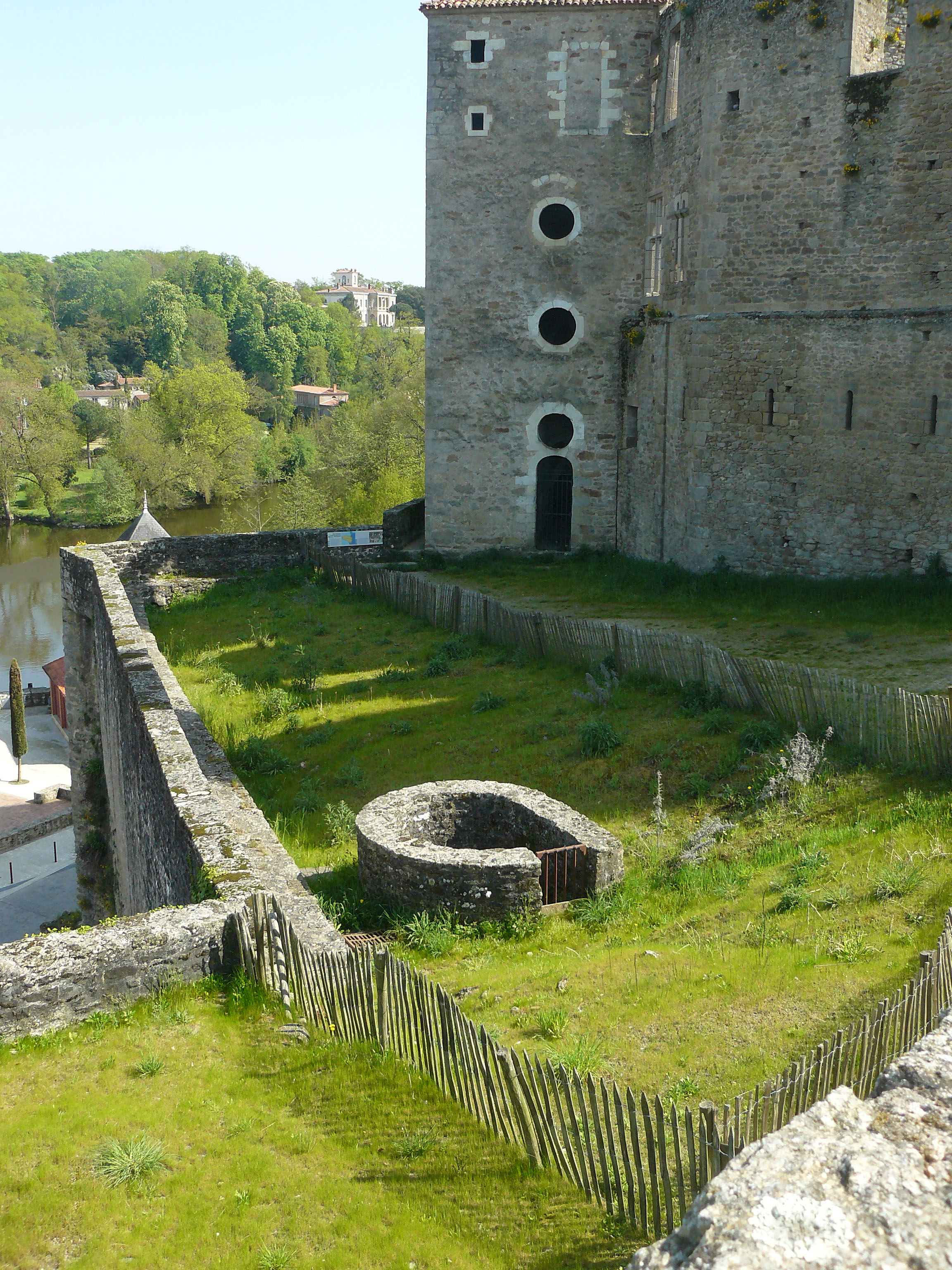 Bastion nord du château de Clisson